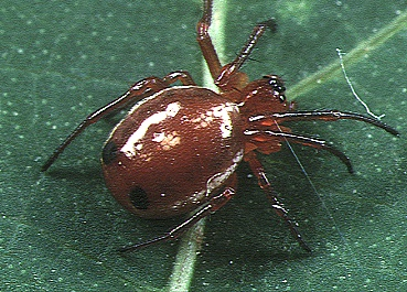 female Hypsosinga sanguinea from Okinawa.